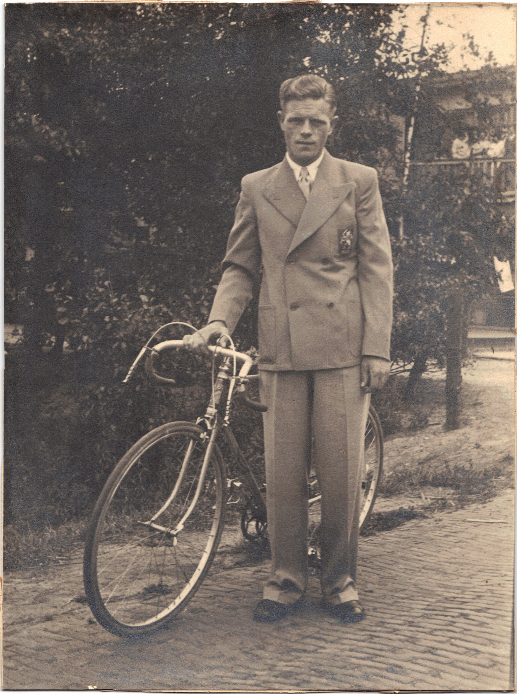 Nicolaas (Nico) van Gageldonk (Klundert, 26 mei 1913 - Breda, 19 mei 1995) was een Nederlands wielrenner en Olympiër